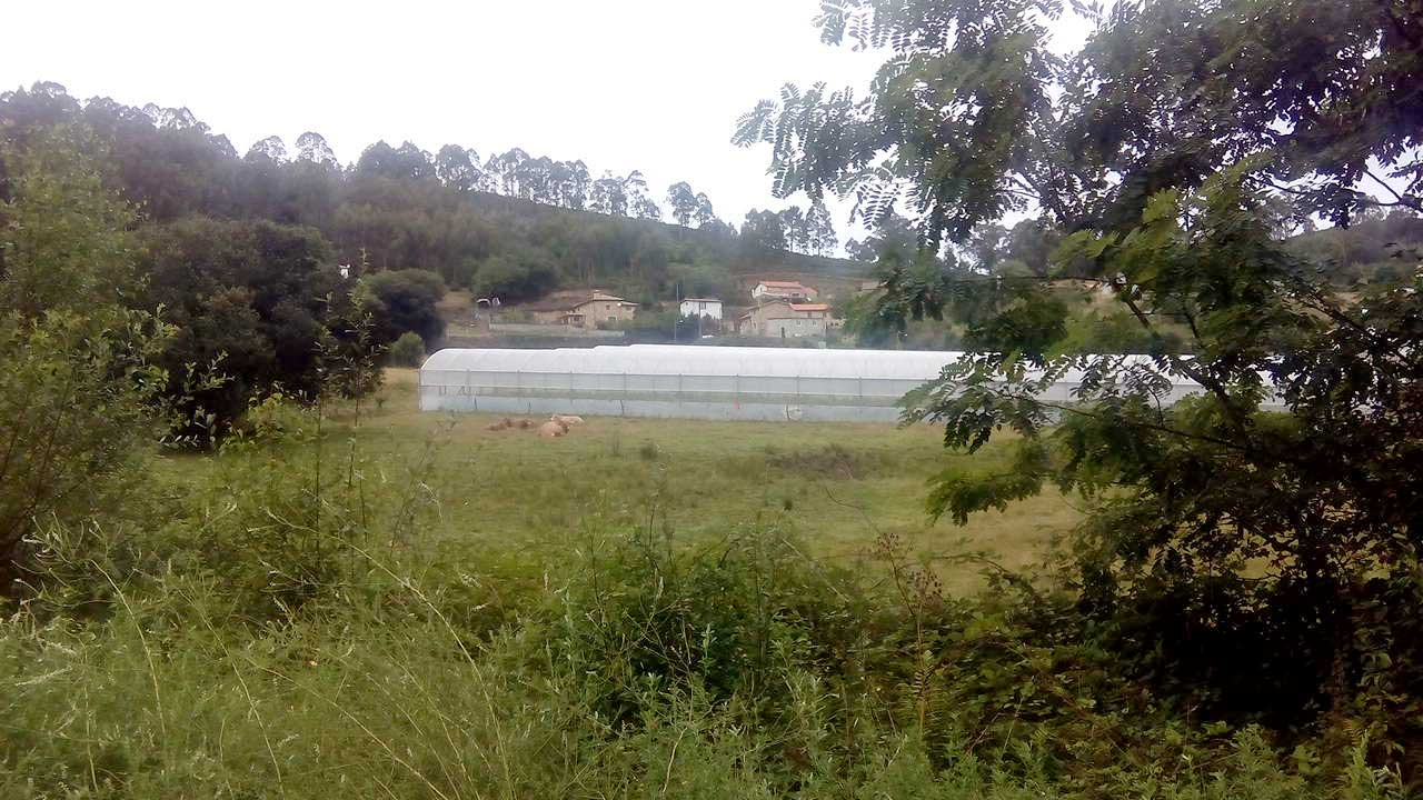 Vista de Bardás, O Val.